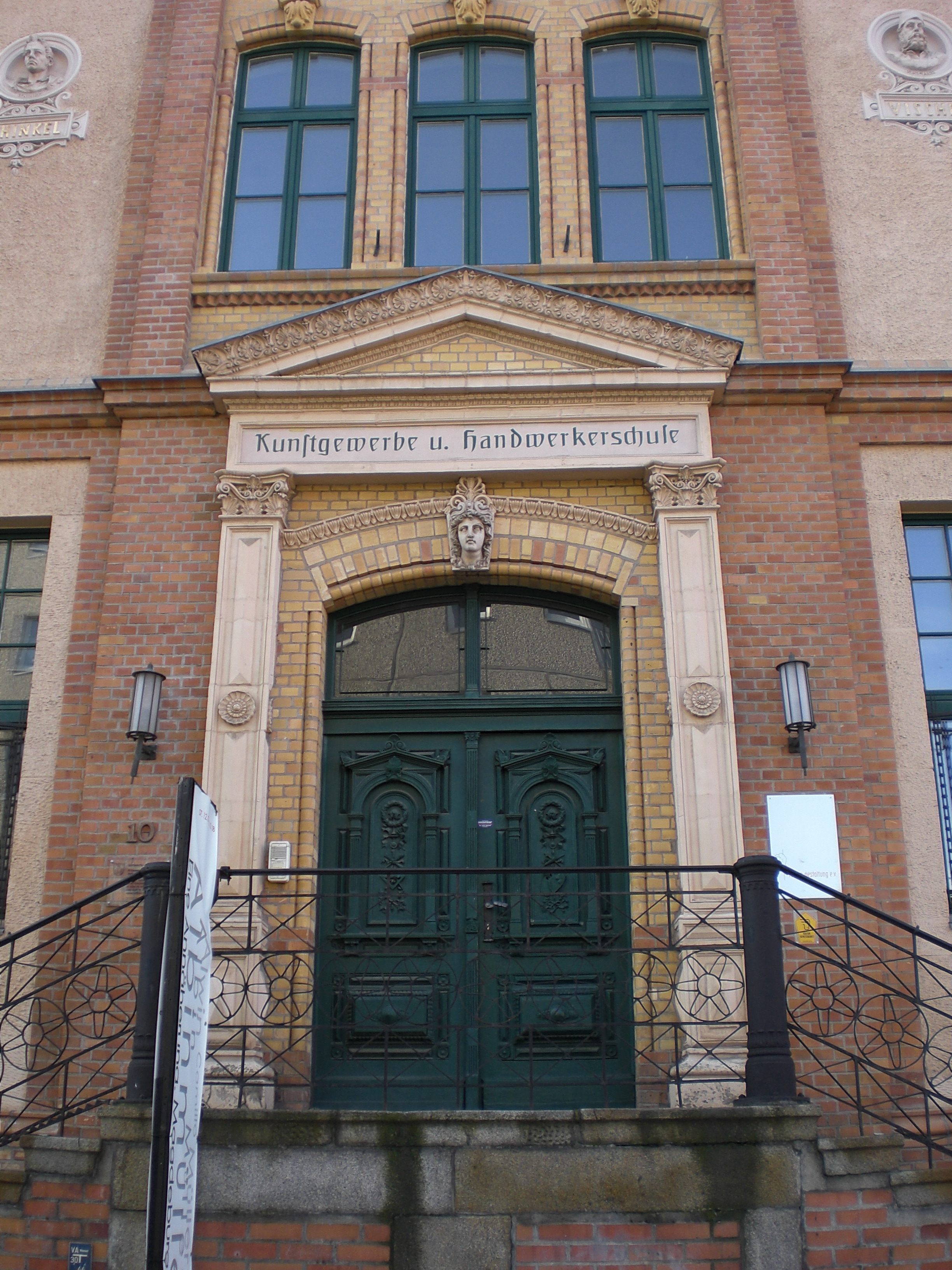 Gebäude der ehemaligen Kunstgewerbe- und Handwerkerschule Magdeburg